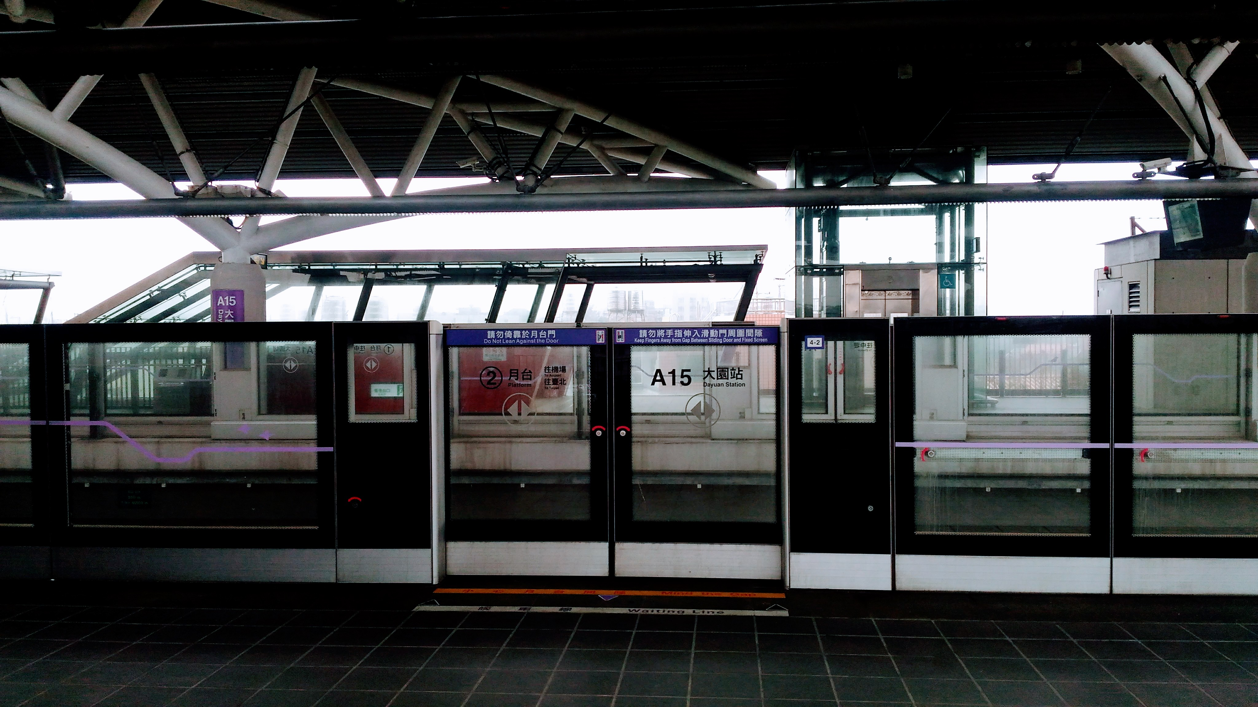 中文（台灣）: 桃園國際機場捷運大園站第二月台的月台門。